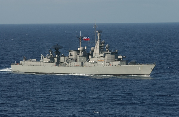 Fragata Almirante Latorre FFG-14